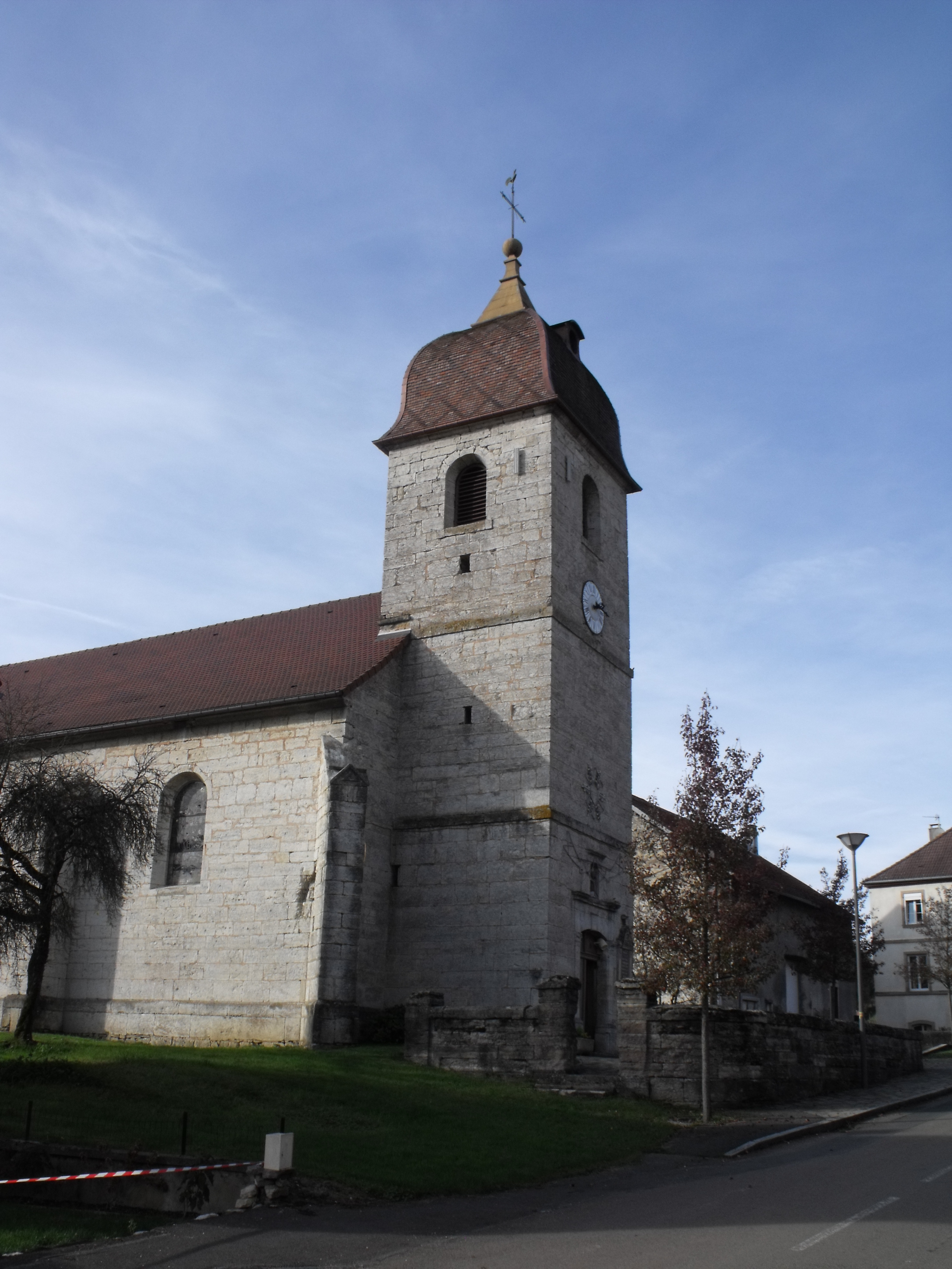 Eglise de Villars sous Ecot, Doubs, France